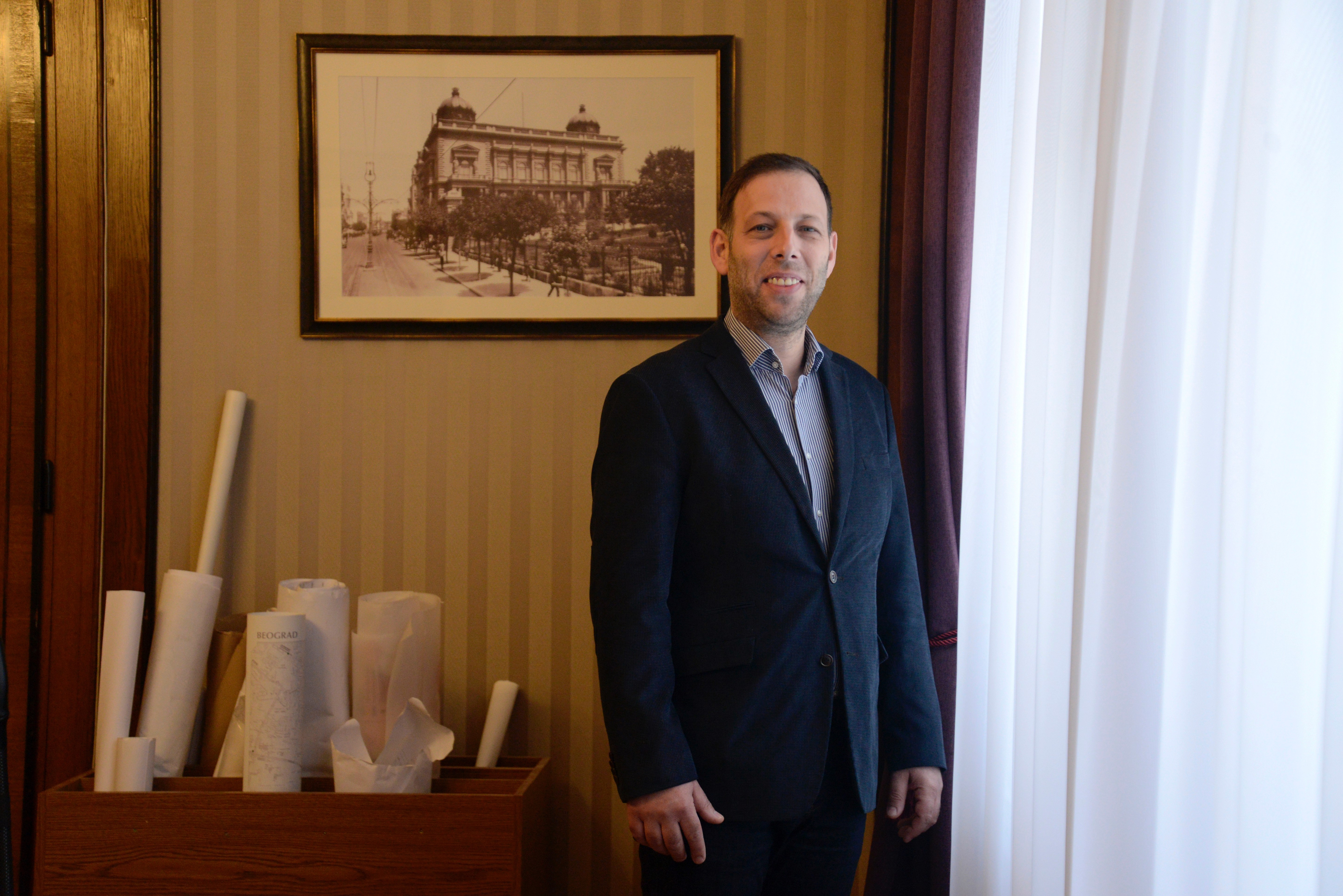 Главни урбаниста